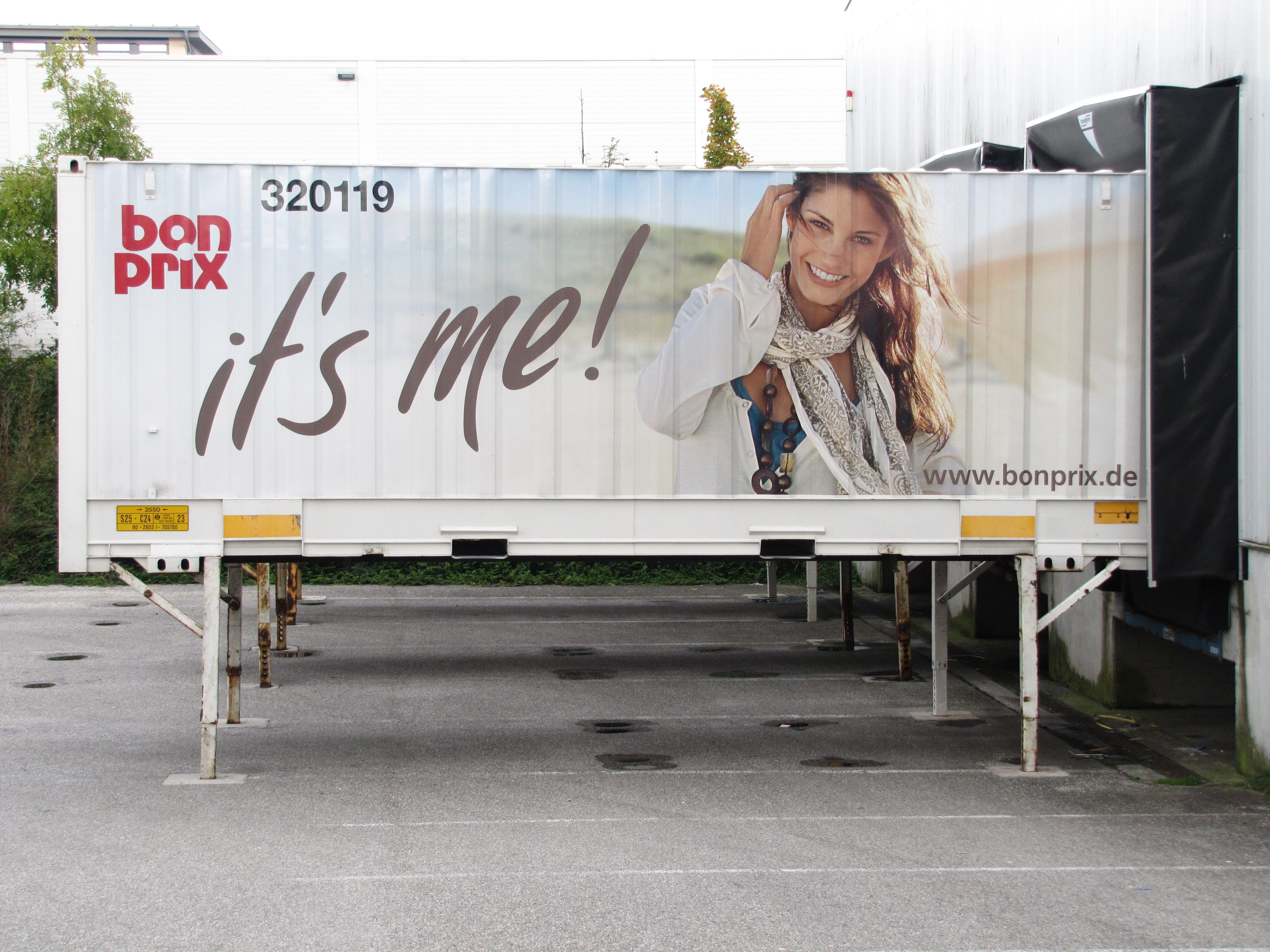 eine Wechsel-Aufbau-Brücke der Hermes Europe mit bonprix-Aufdruck